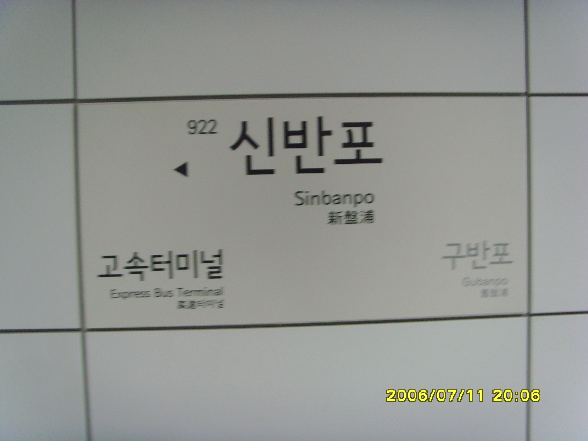 ソウル地下鉄9号線新盤浦駅 駅名標